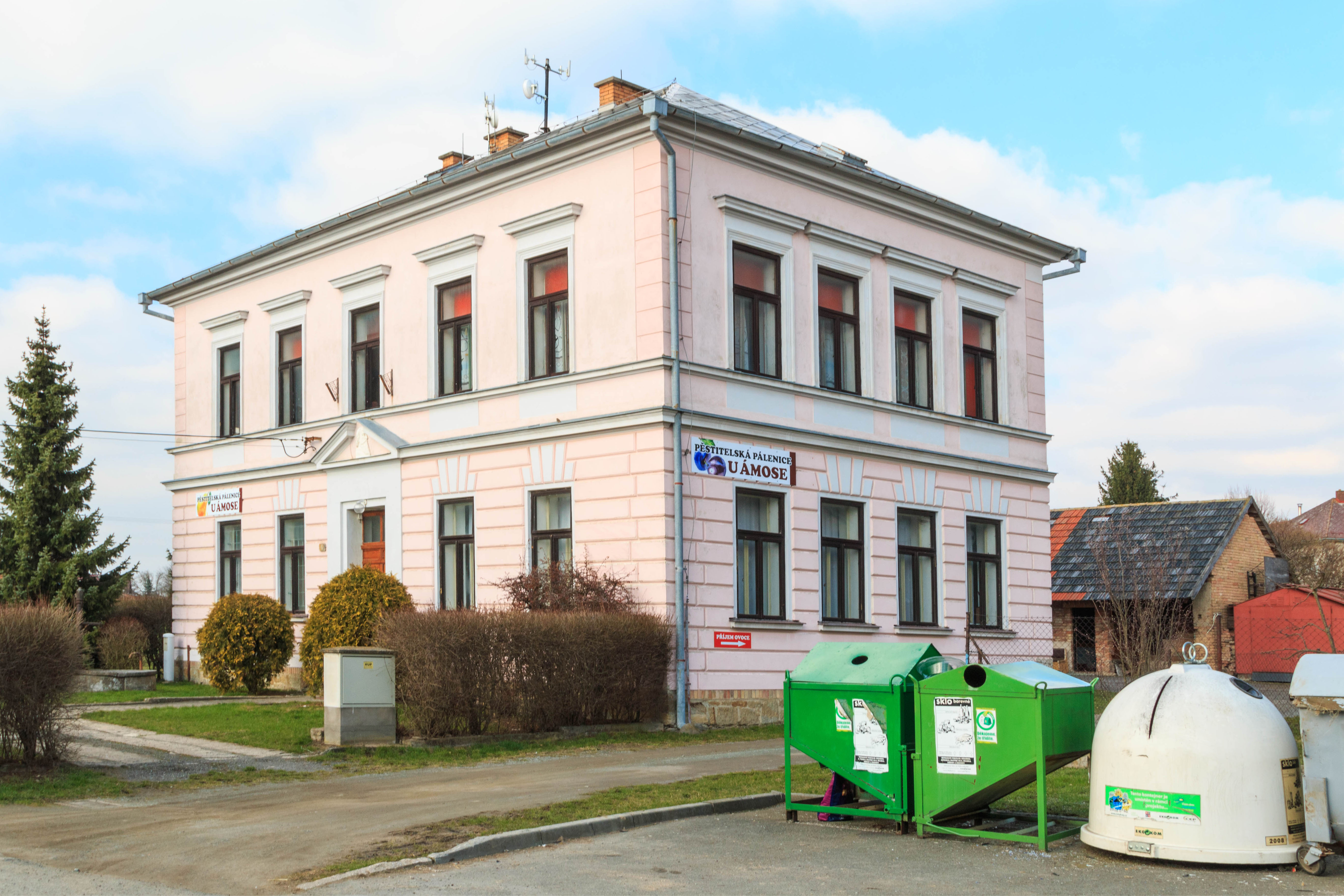 Brocná - pálenice